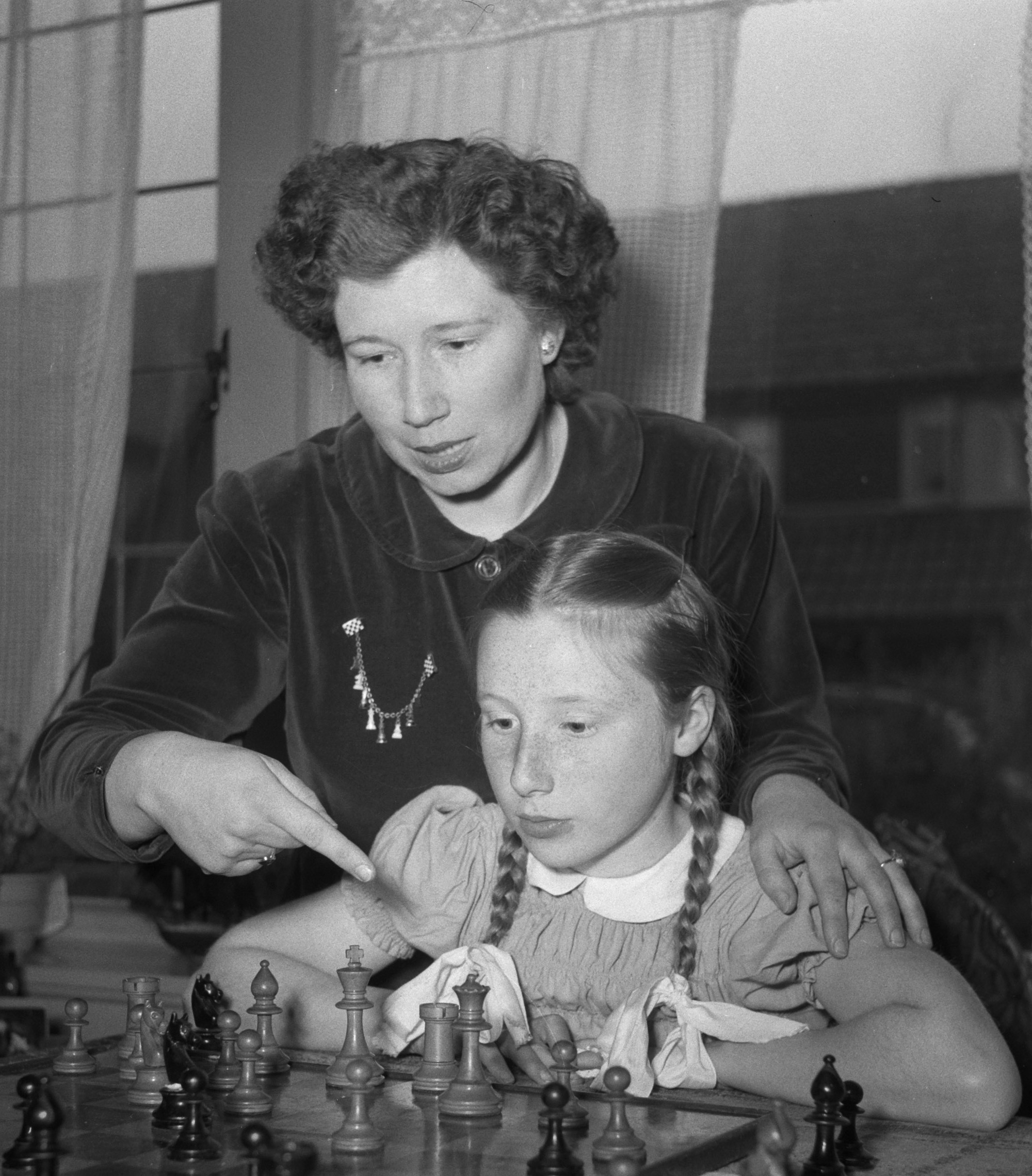 Fenny Heemskerk (kampioen damesschaken) met dochter